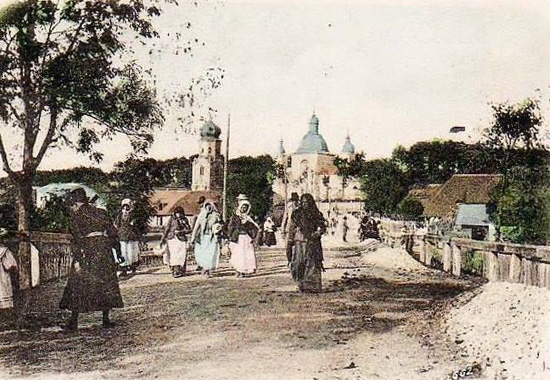 Вигляд на тернопільську «Рогатку» з вулиці Микулинецької на давній світлині 1902 року.